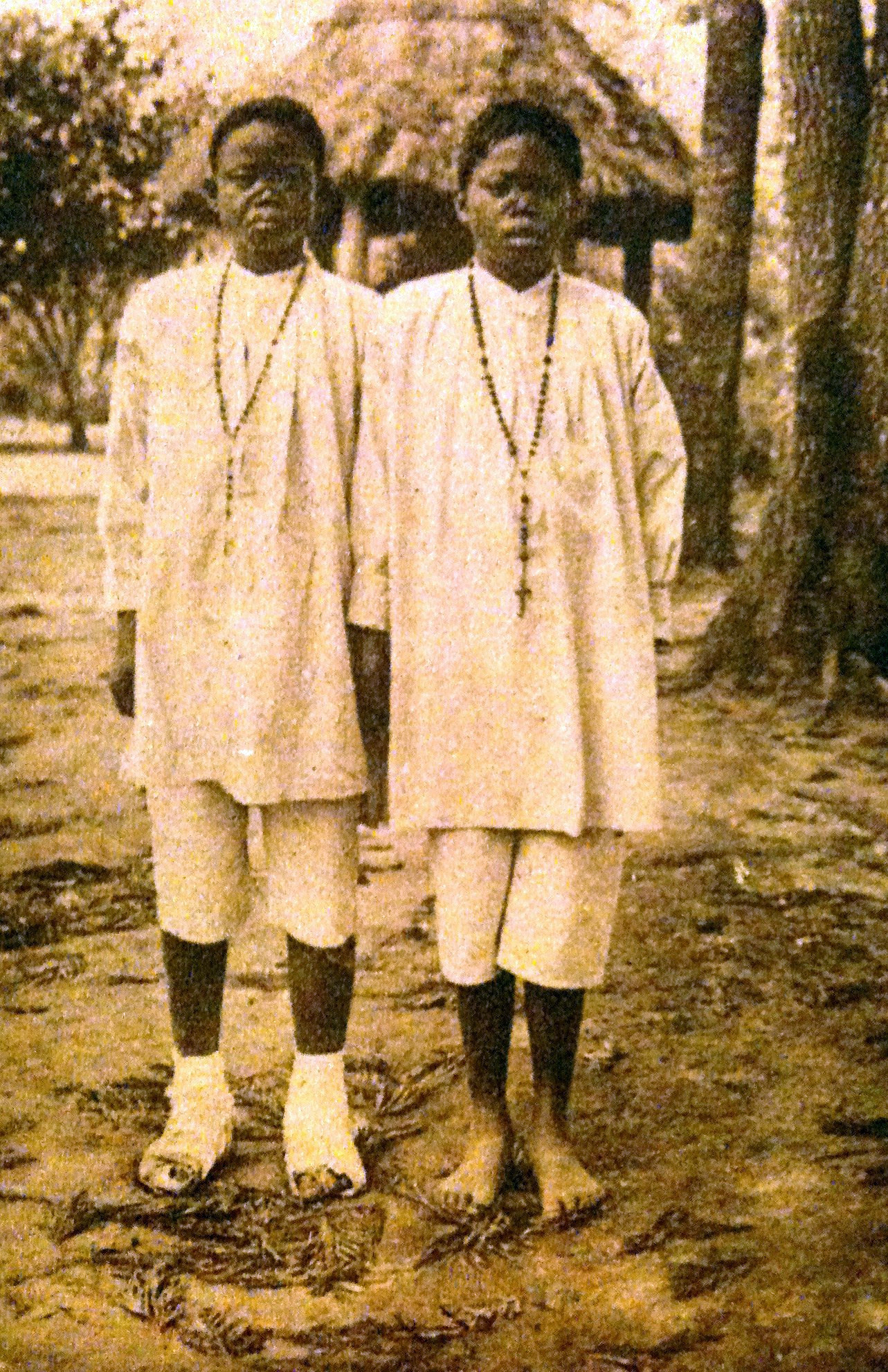 Deux jeunes Malgaches affectés par la lèpre soignés dans le dispensaire de la mission de Nossi-Bé (avant 1933).